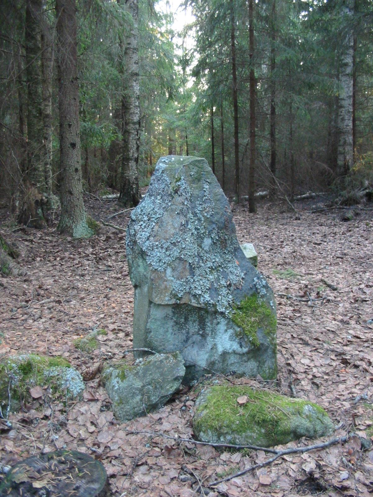 Pirtiniemennokan rajakivi Loimaan, Ypäjän, Someron ja Tl Kosken rajalla huhtikuussa 2011.